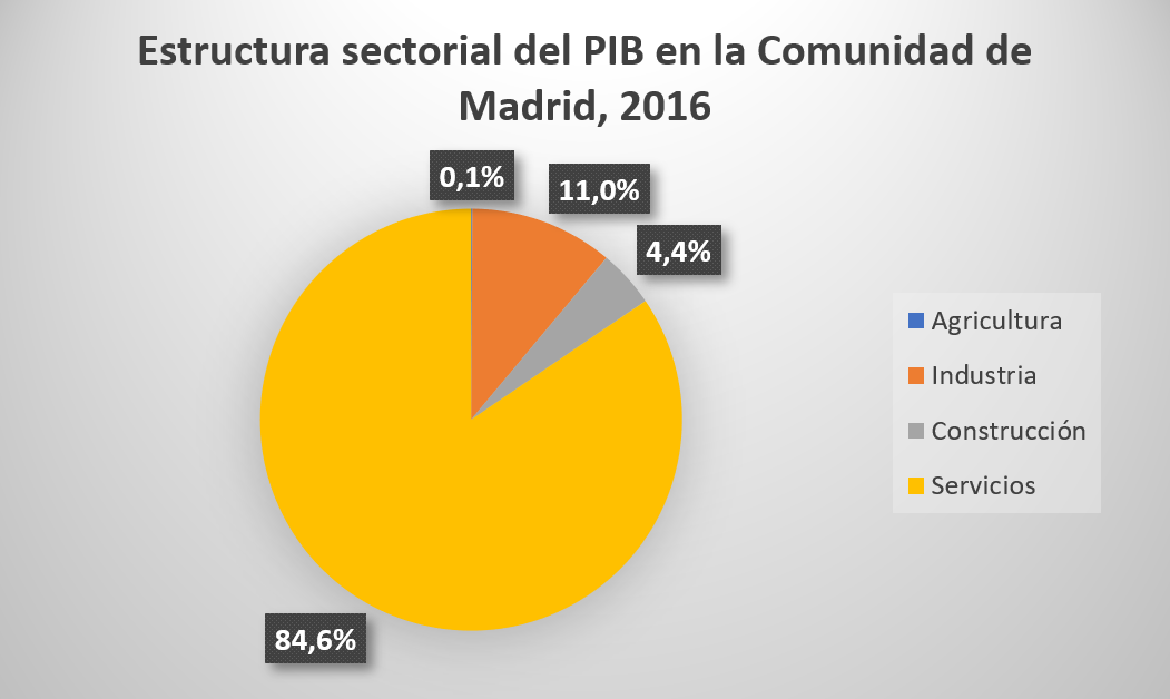 Estructura sectorial del PIB en la Comunidad de Madrid, 2016